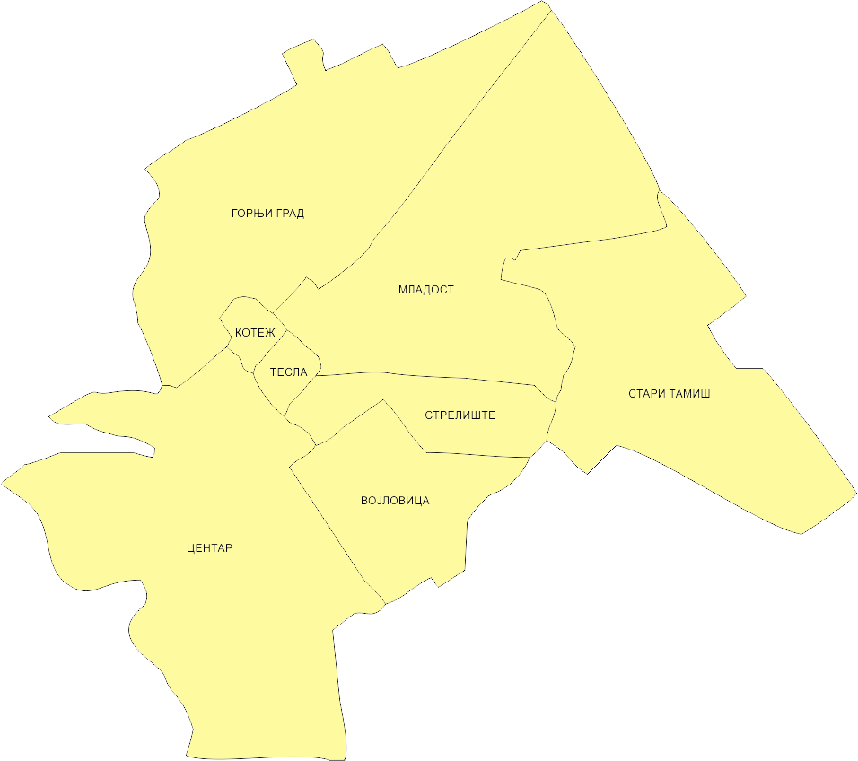 Srpski (latinica): Granice mesnih zajednica na teritoriji Pančeva.